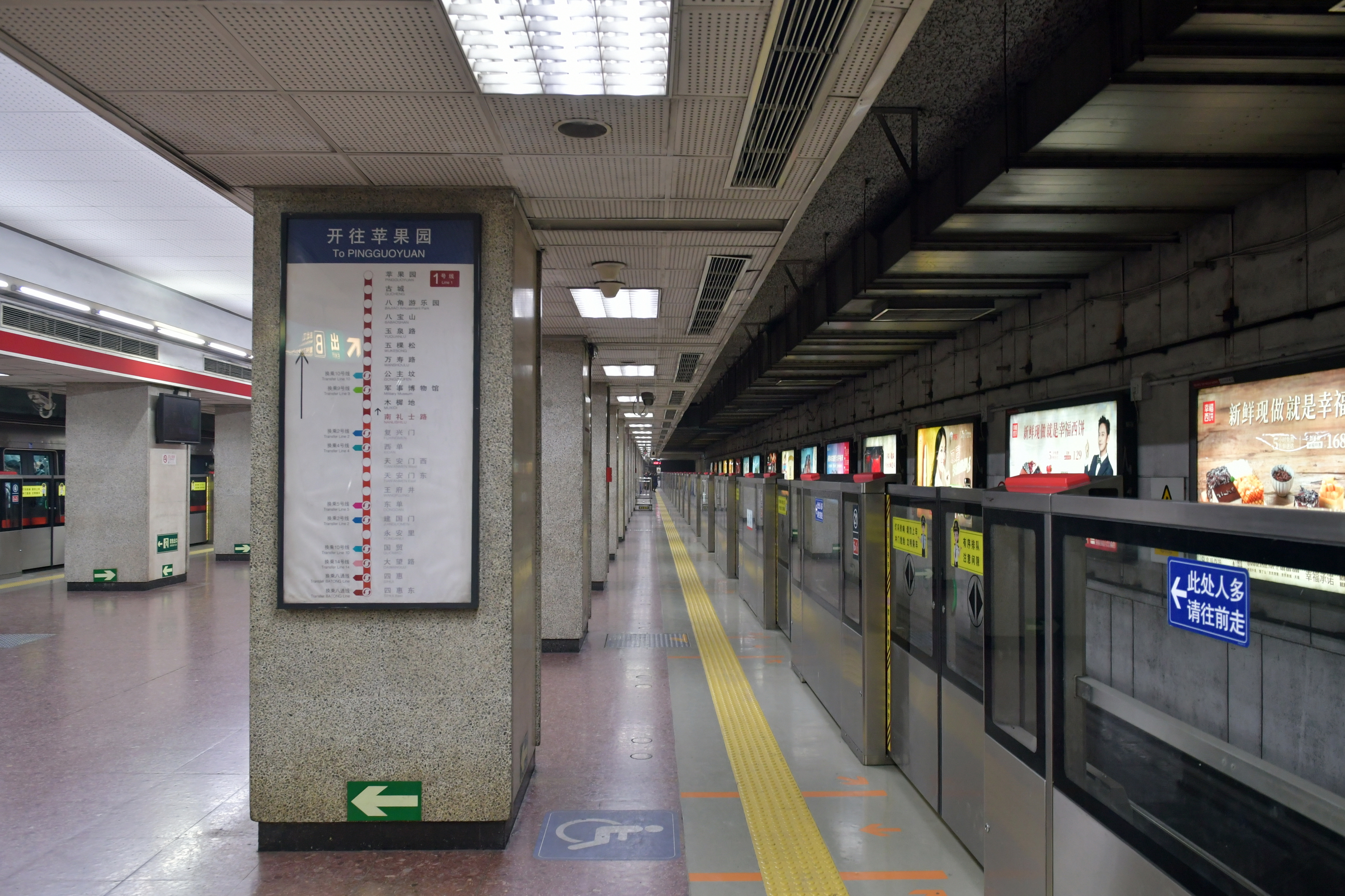 北京地铁1号线南礼士路站站台。站台加装半高式安全门，2017年投入使用。